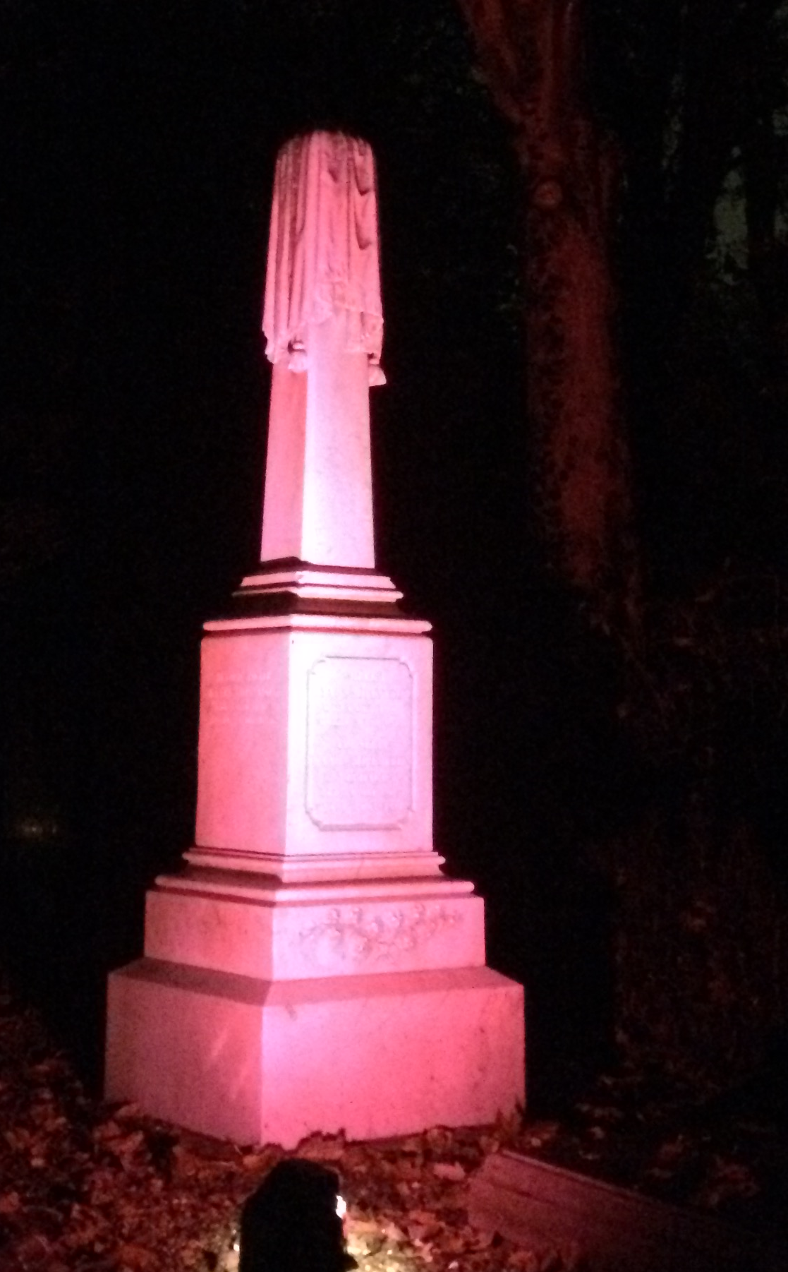 Zijn grafmonument op de begraafplaats aan de Eikenlaan, Krommenie